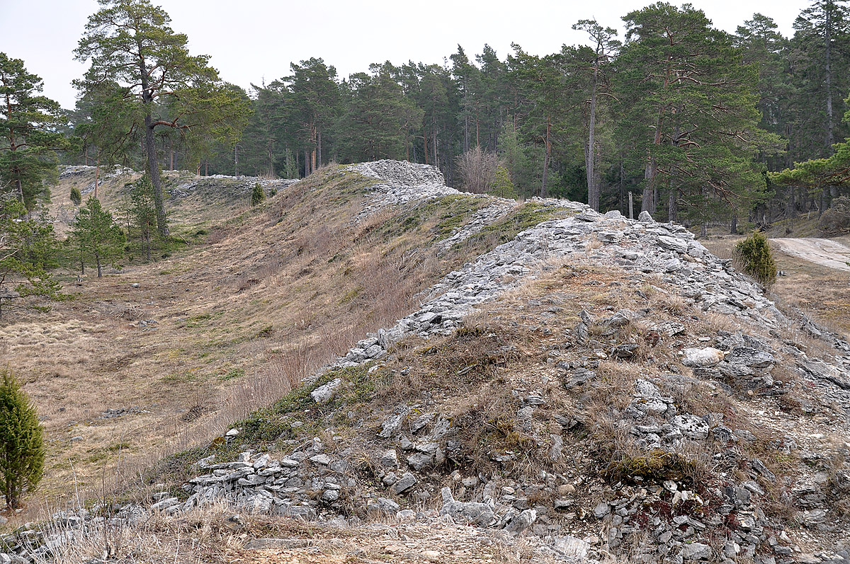 Fornborg. Murarna på sydsidan når 5 meter i höjd.